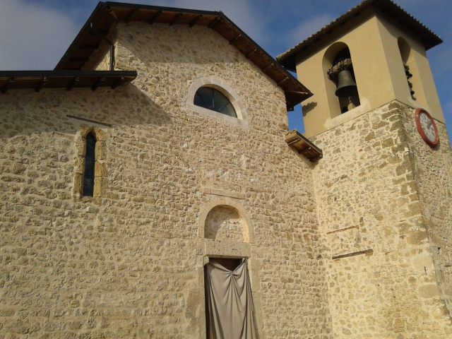 Facciata e campanile dell'antica chiesa di Sant'Egidio